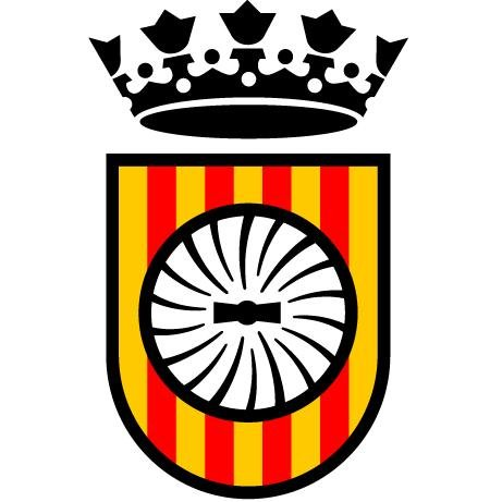 Aquest és l'escut oficial de Molins de Rei, en l'interior del qual trobem una roda de molí sobre la senyera amb les quatre barres verticals; sobre l'escut trobem una corona reial.